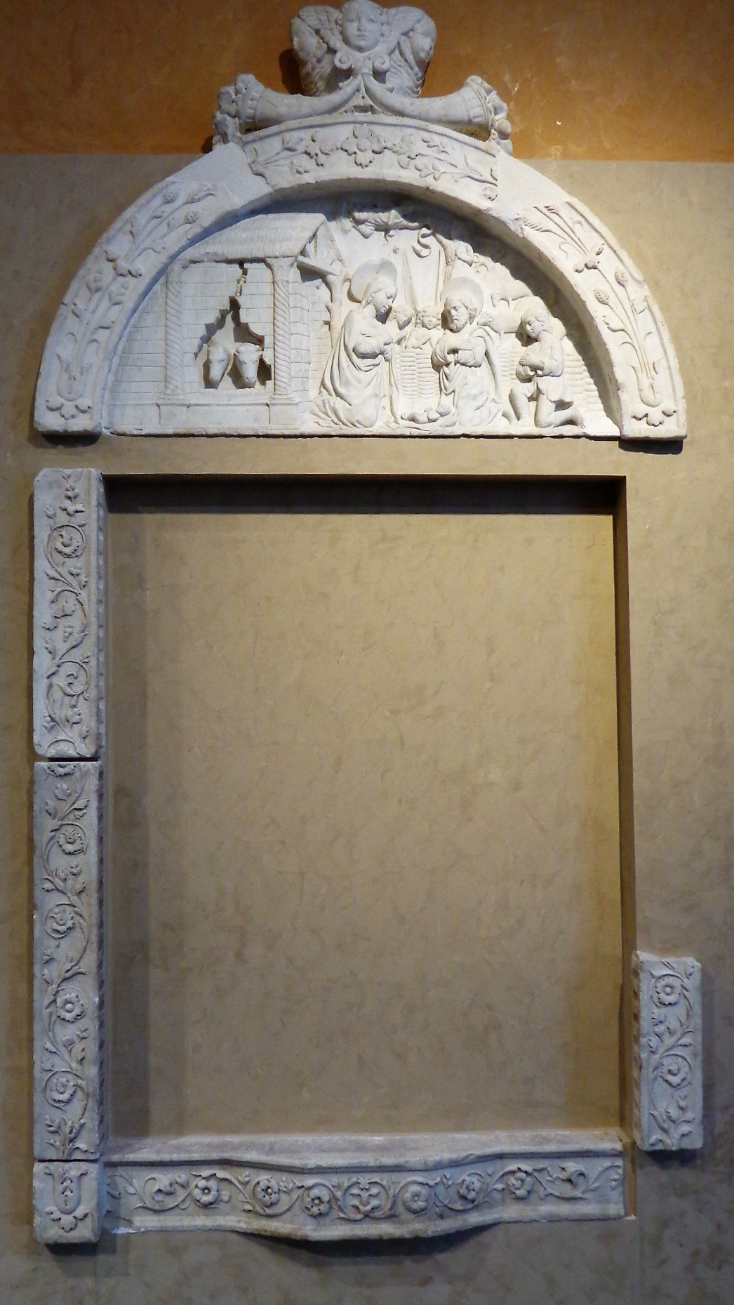 Edicola